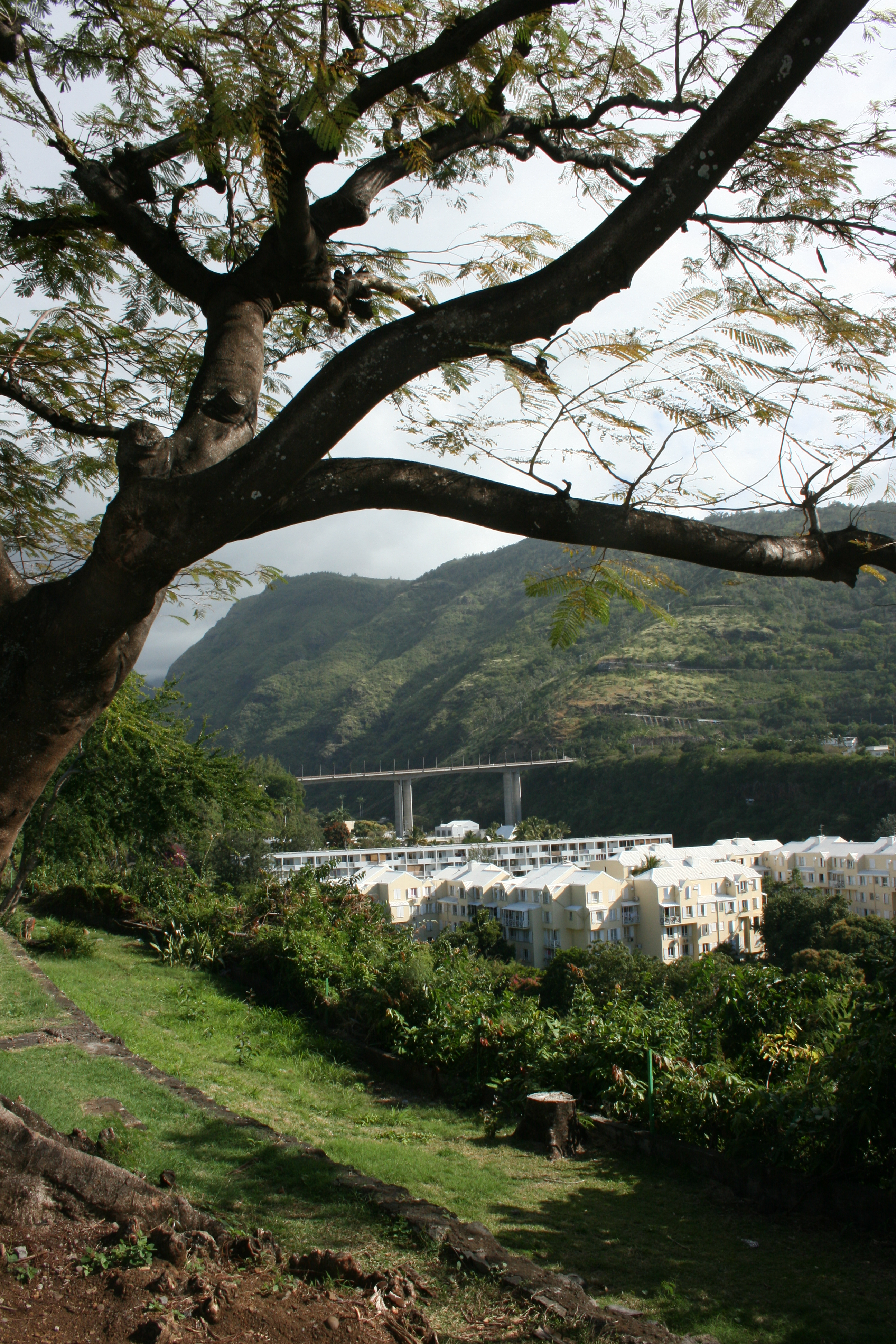 Vue du pont Vinh San à Saint-Denis de la Réunion